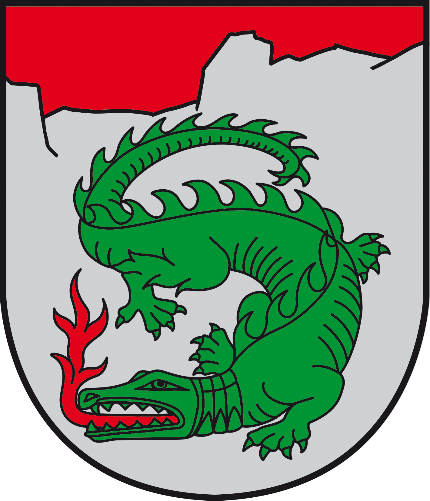 Die Wiederverleihung des Gemeindewappens erfolgte mit Wirkung vom 20. Februar 2016. Das Wappen stellt eine Mischform des vorherigen Liezener und des vormals Weißenbach bei Liezener Wappens dar.